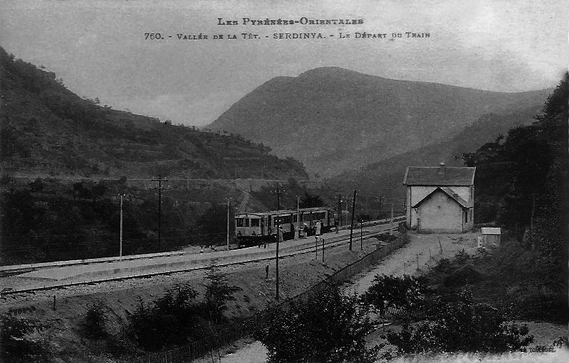 La halte de Serdinya, le départ du train, au début des années 1910.